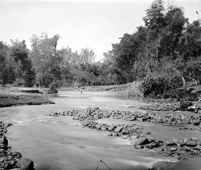 Negatief. Rivier de Brantas, Surabaya, Java